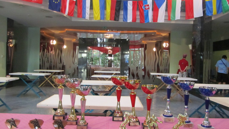 3й Чемпионат Мира WTHA 2012